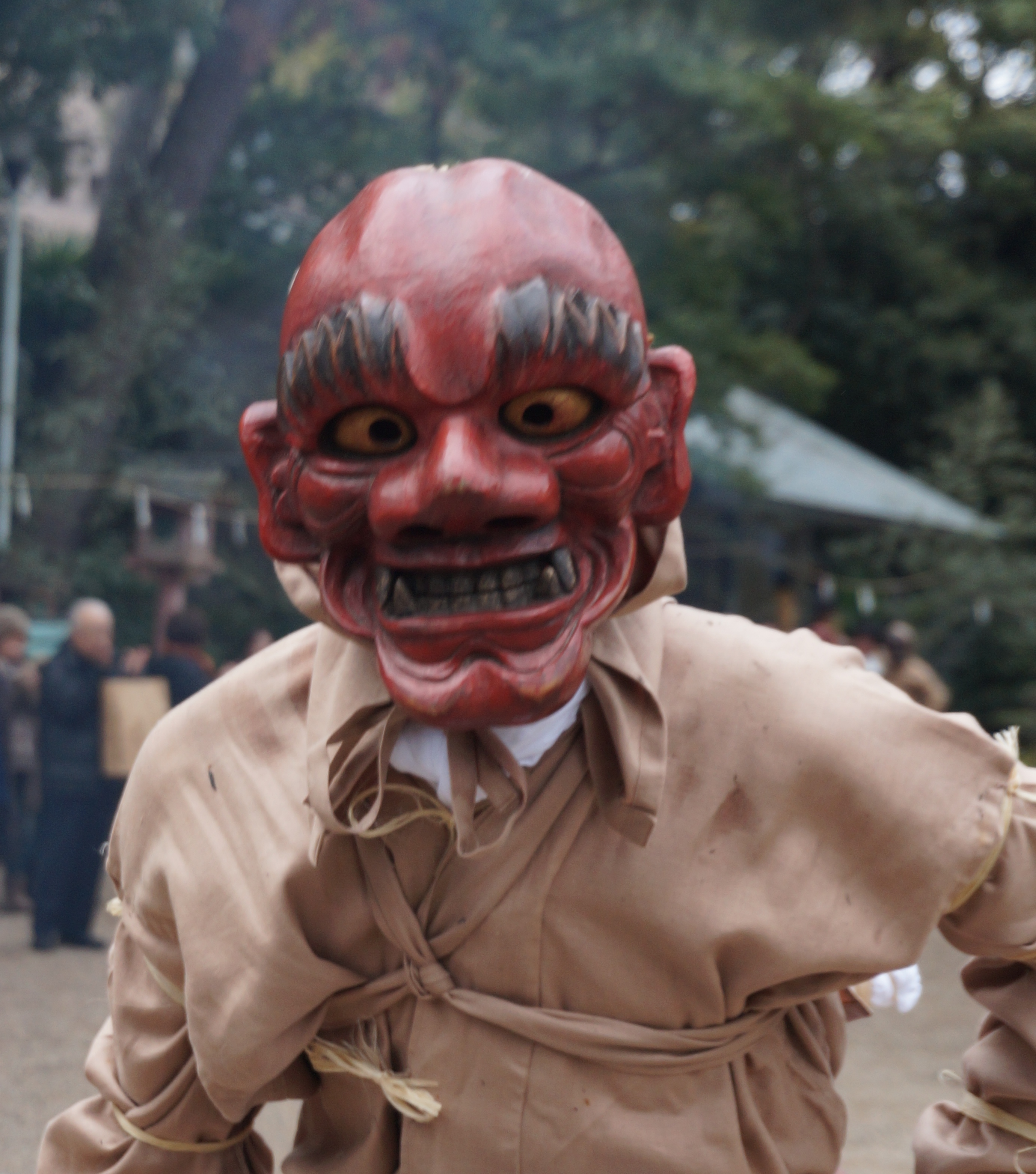 Ichiban Tarô oni (Tarô le premier démon)